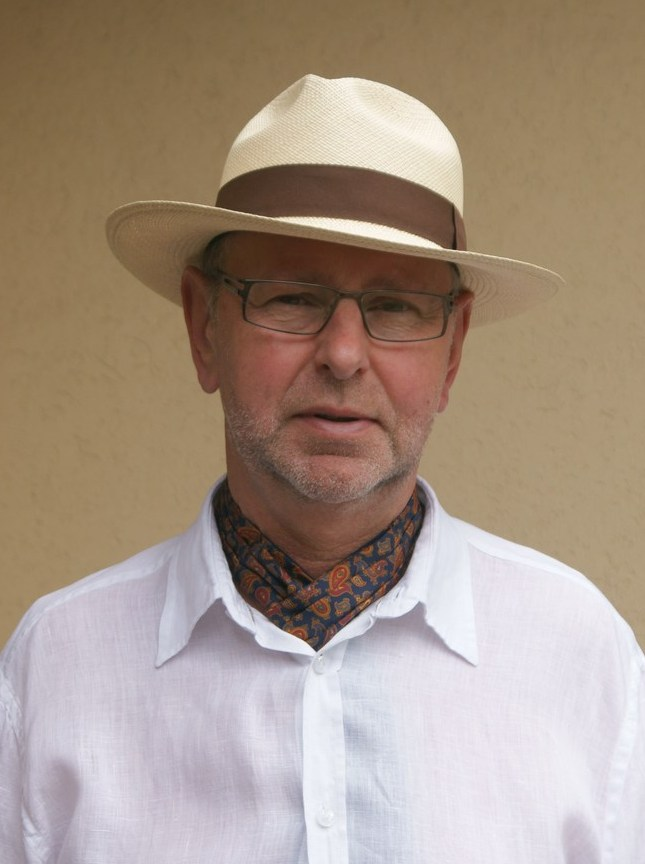 Jacques SCHLEEF, directeur du festival Summerlied